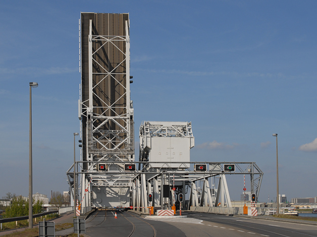 Noordkasteelbruggen in de Haven van Antwerpen